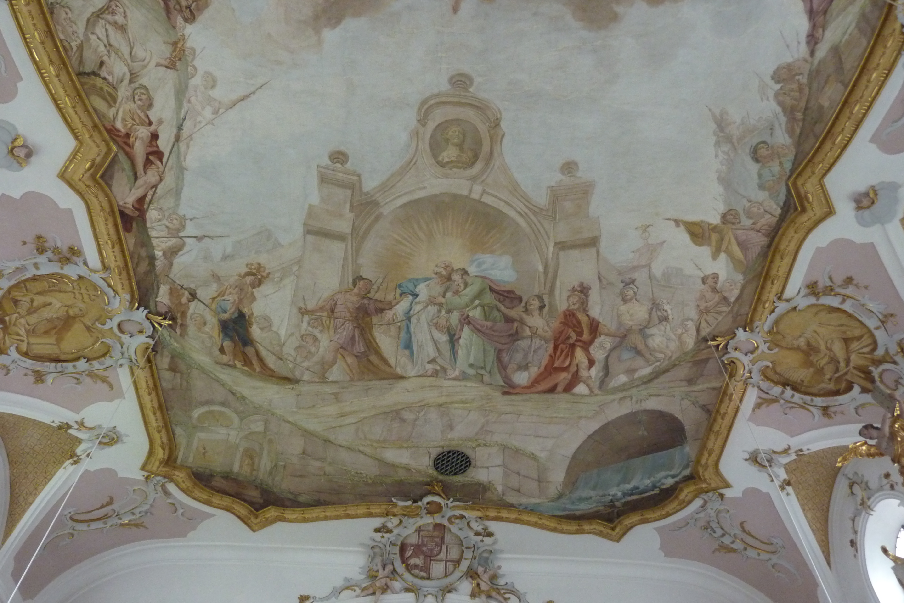 Katholische Pfarrkirche Mariä Reinigung in Steinheim an der Donau, Deckenfresko von 1776 von Matthäus Günther, Darstellung der Gefangennahme der Apostel Petrus und Paulus, darunter Wappen des Augsburger Fürstbischofs Clemens Wenzeslaus von Sachsen (Erläuterung siehe File:Trier Hauptmarkt Hauptwache Wappen.jpg